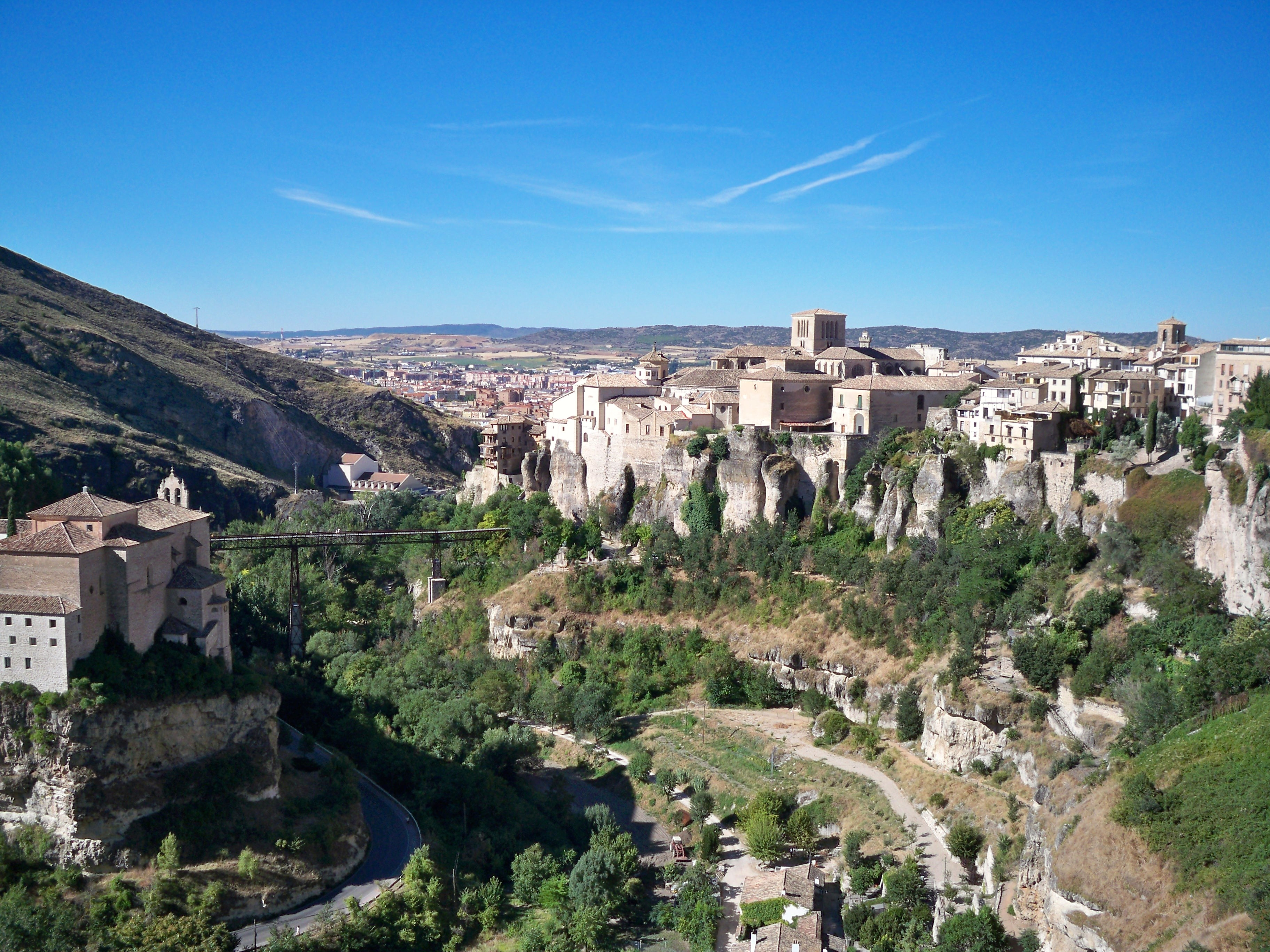 Vista del casco antiguo de la ciudad de Cuenca desde la hoz del Huécar, con el puente de San Pablo, las casas colgadas y el convento de San Pablo. Al fondo ciudad moderna.